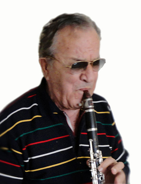 Srpskohrvatski / српскохрватски: Fotografija Radivoja Lazića, 1. 6. 2012. Informacije Description Božidar-Boki Milošević Date1.06.2012.Sourcelični radAuthorRadivoj Lazić Božidar-Boki Milošević